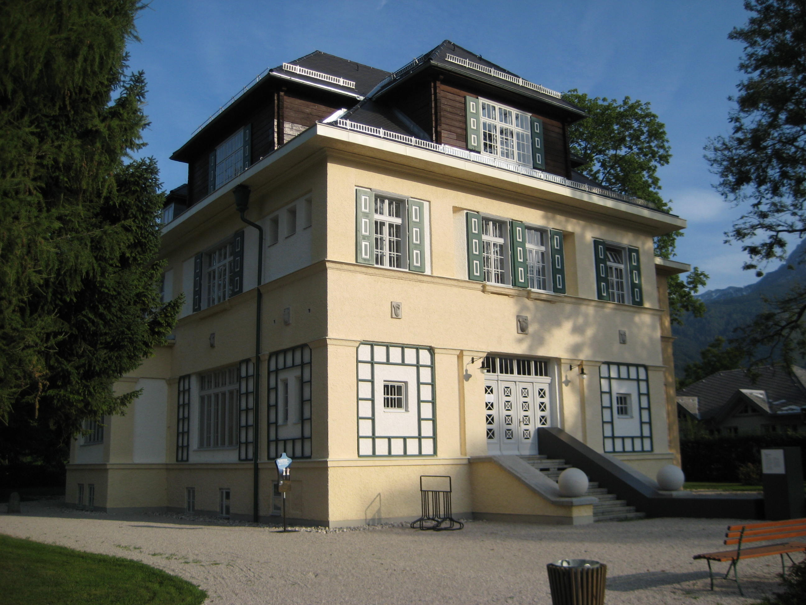 Museum Deutschvilla in Strobl